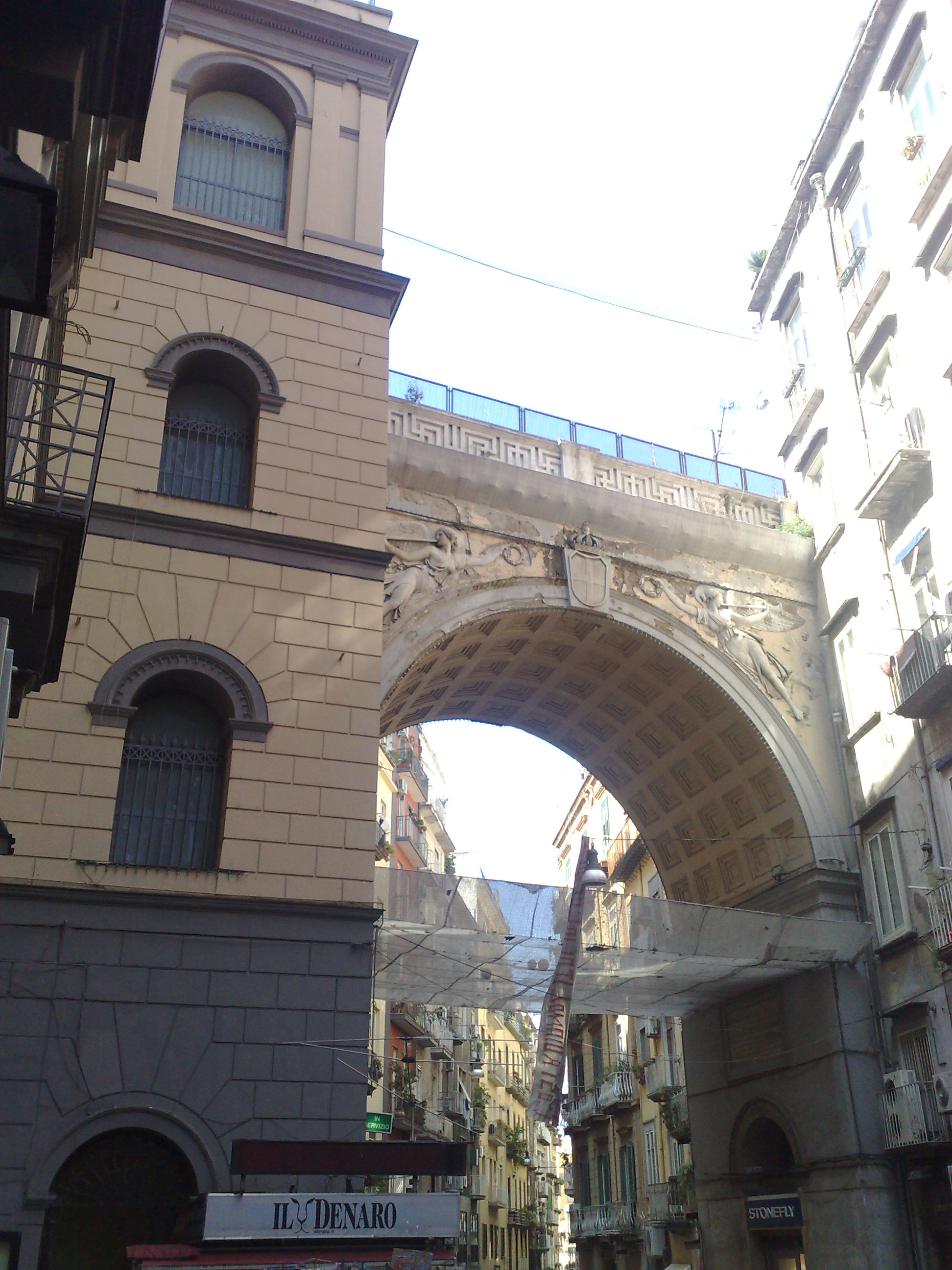 Ponte di Via Chiaia di Napoli